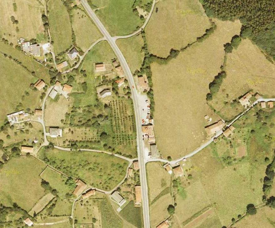 Vista aérea de la parroquia rural de Cabruñana, en Grado